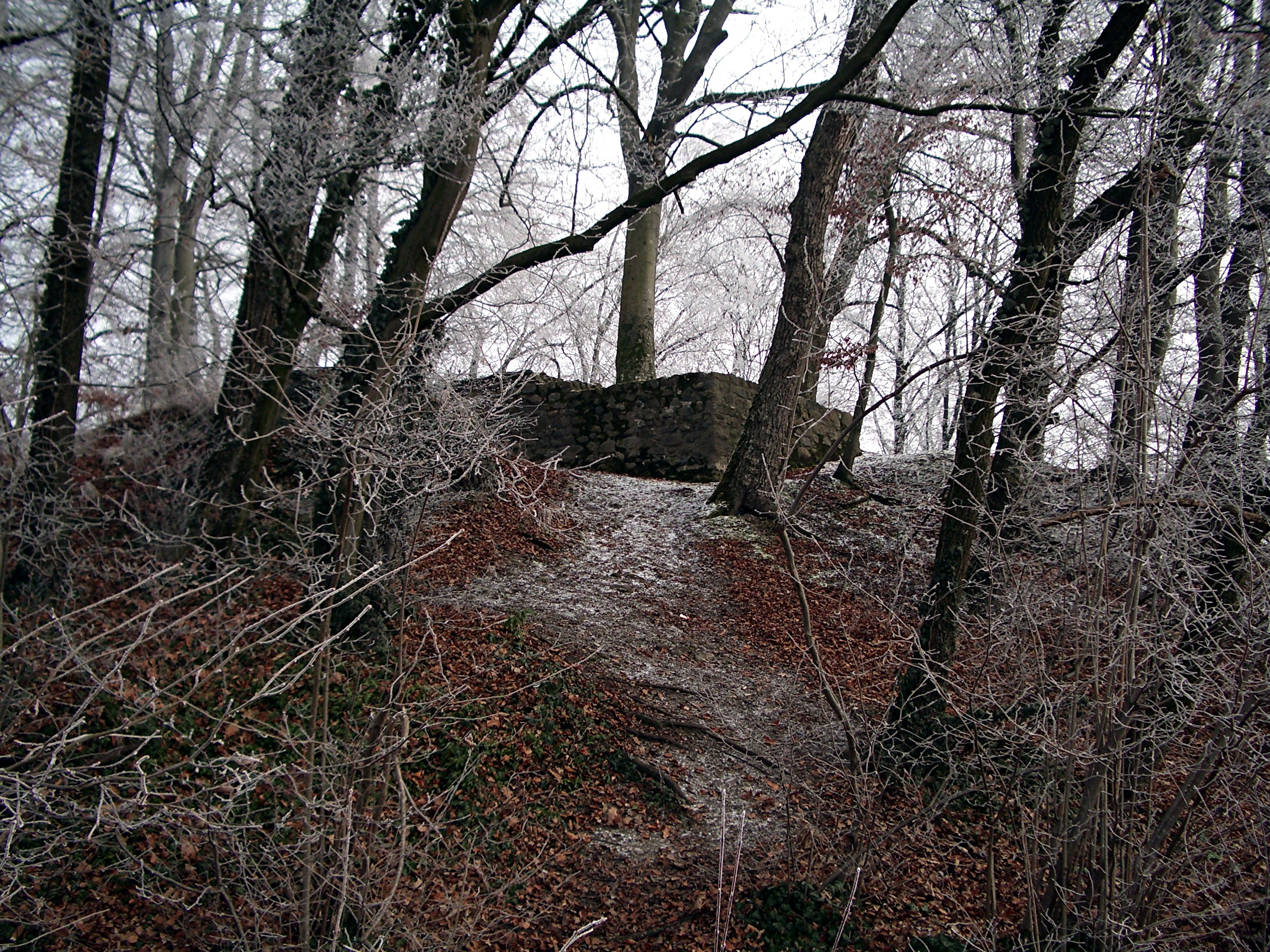 Moosburg castle, Effretikon ZH, Switzerland